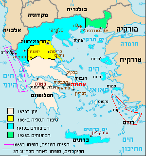 מפה של כיבושי יוון המודרנית עד להגעתה לשטחה הנוכחי.